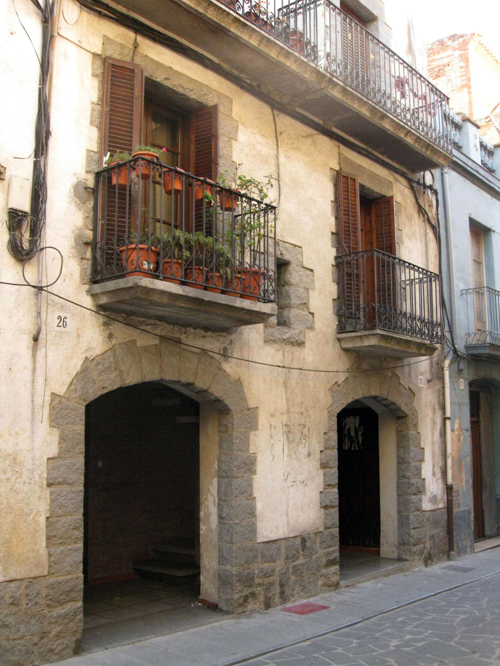 Ateneu Popular d'Hostalric. Object location41° 44′ 45.6″ N, 2° 38′ 18.01″ E